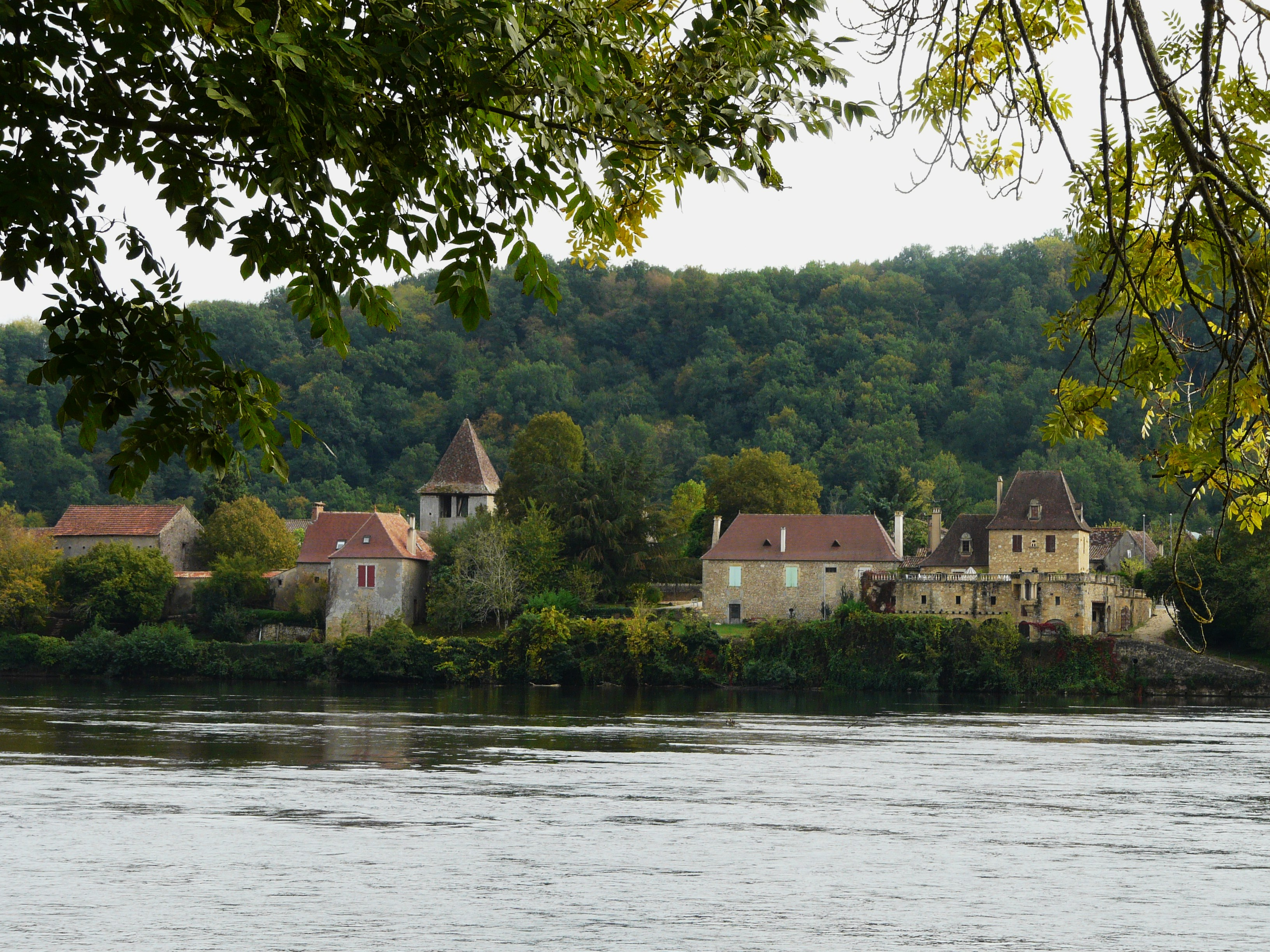 Au bord de la Dordogne, le village de Pontours, Dordogne, France.